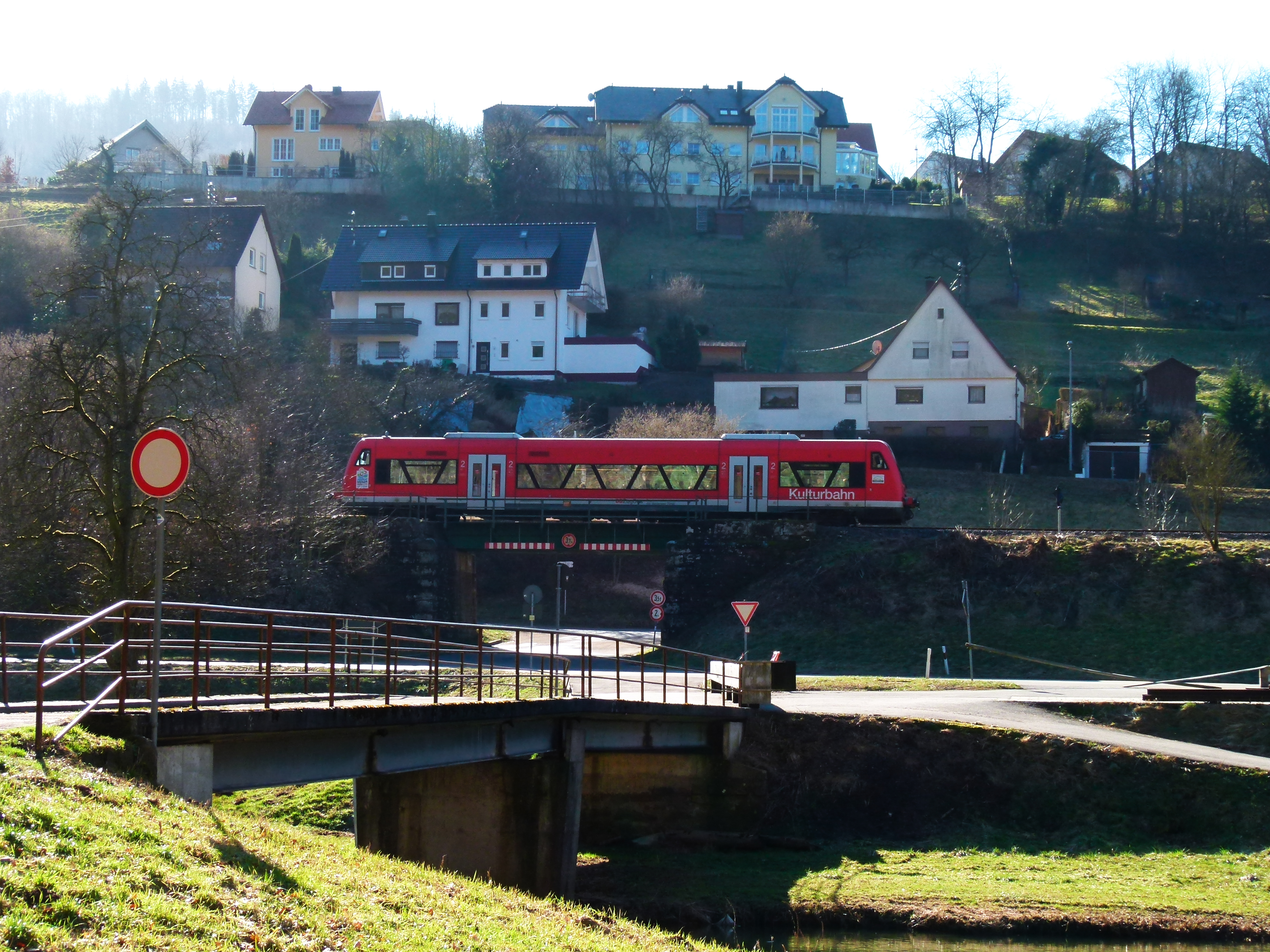 Kulturbahn Pforzheim-Calw-Horb, Blick auf Unterreichenbach